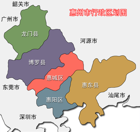 惠州市行政区划图 绘制：长夜无风 日期：2005年12月19日